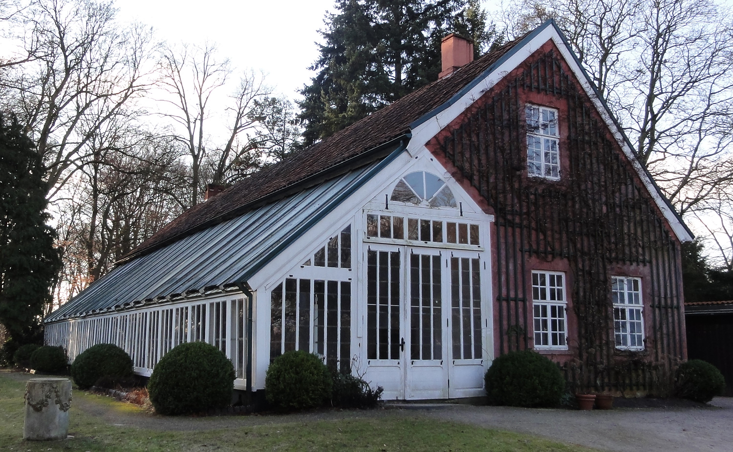 Orangerie in Bremen Oberneuland, Rockwinkeler Landstrasse 41/43. Herstellung um 1790. Unter Denkmalschutz seit 1982. Ansicht: Ost Das abgebildete Objekt ist ein geschütztes Kulturdenkmal in der Freien Hansestadt Bremen, mit der Nr. 1452 beim Landesamt für Denkmalpflege registriert.